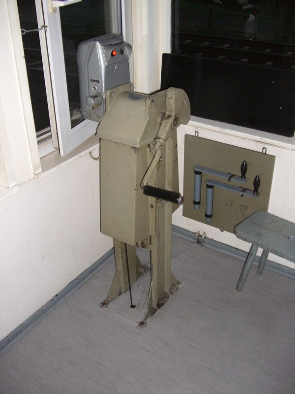 Handkurbel zum Betrieb der Schranken am Bahnübergang Hauneck-Unterhaun